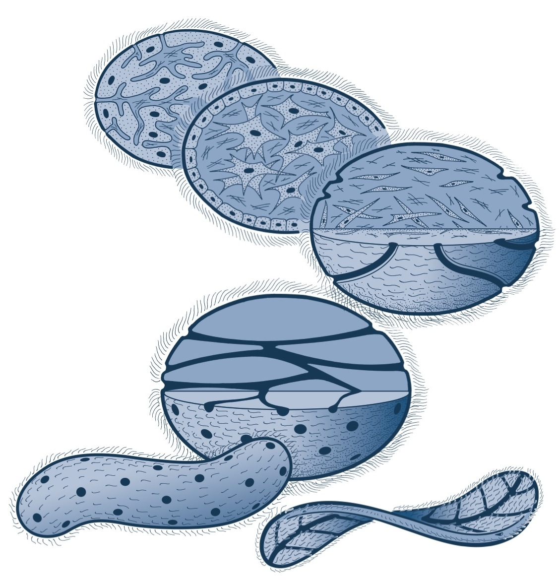 Entstehung und Evolution der Gallertoide aus einem vielkernigen Einzeller mit ausgedehntem endoplasmatischen Reticulum in das hinein Skelroproteine eingelagert wurden. Dieser Vorgang stabilisierte den Körper von innen heraus und erlaubte weiteres Größenwachstum und Differenzierungen. Es entsteht schließlich die vielzellige Körperkonstruktion der Tiere, bei der Zellen in einer bindegewebigen (kollagenösen) Grundmatrix eingebettet sind. Namensnennung: Manfred Grasshoff, Michael Gudo, Tareq Syed